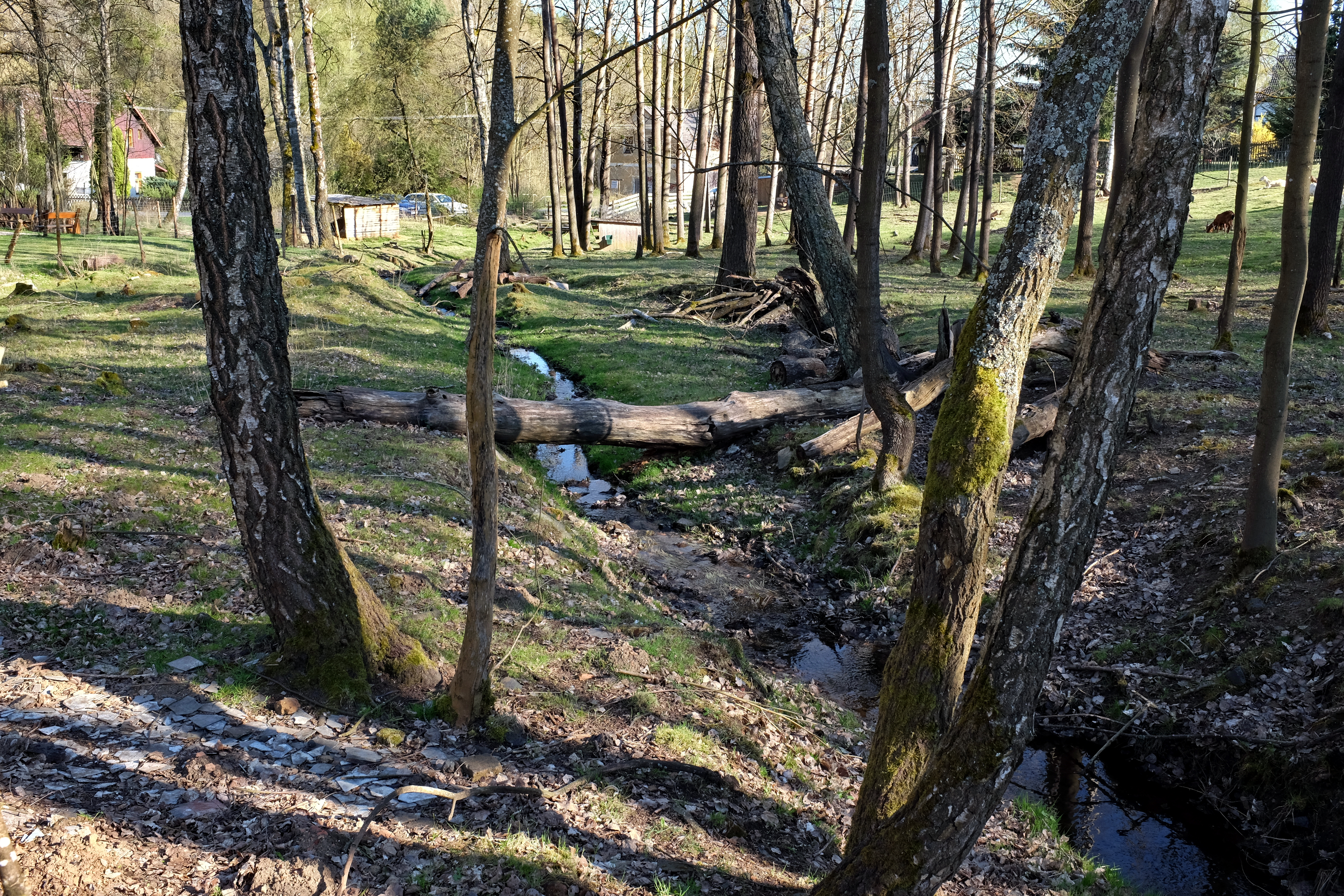 Huťský potok, přítok Hamerského potoka, v Chodovské Huti, okres Cheb